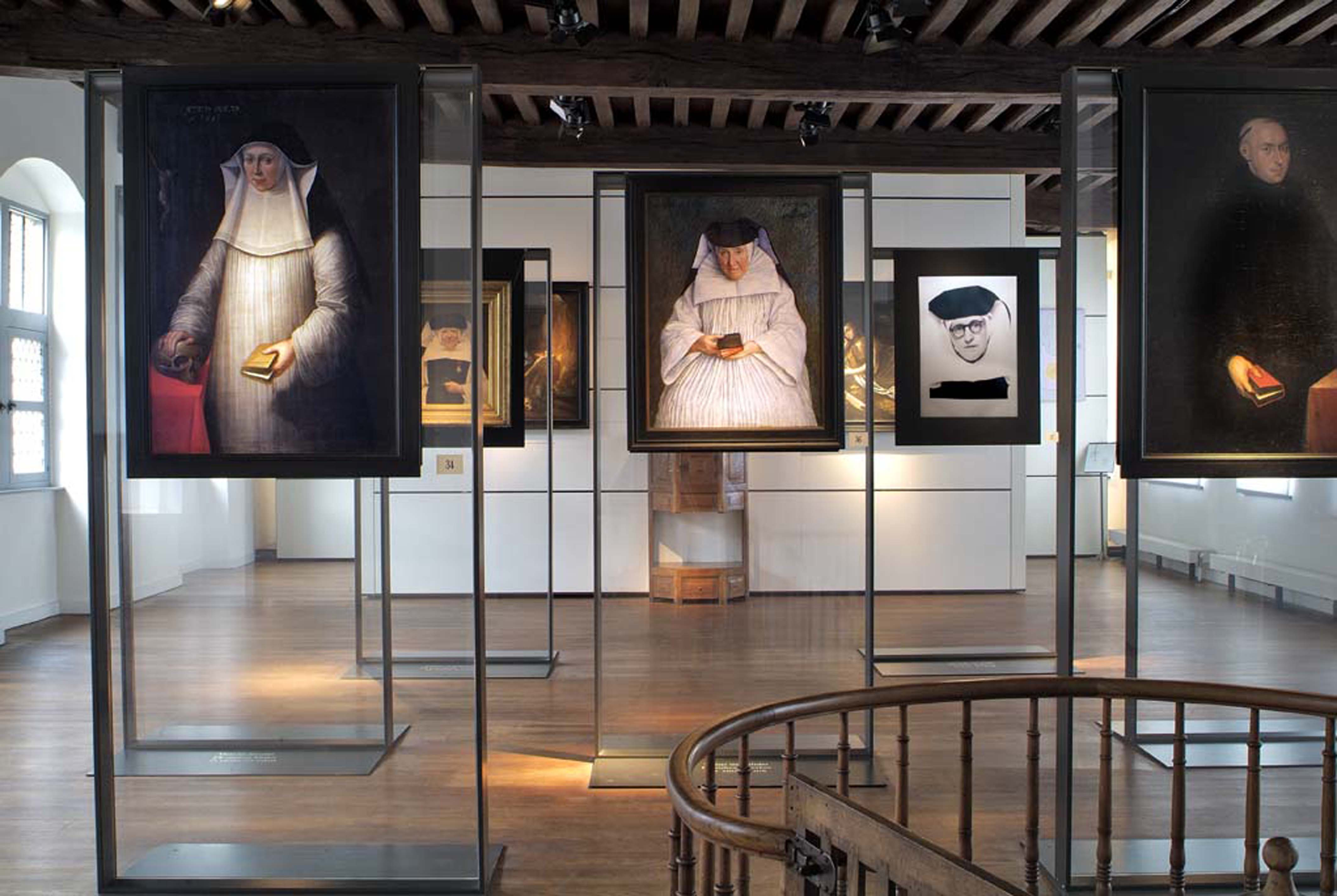 tableaux présentant les différents dames prieurs